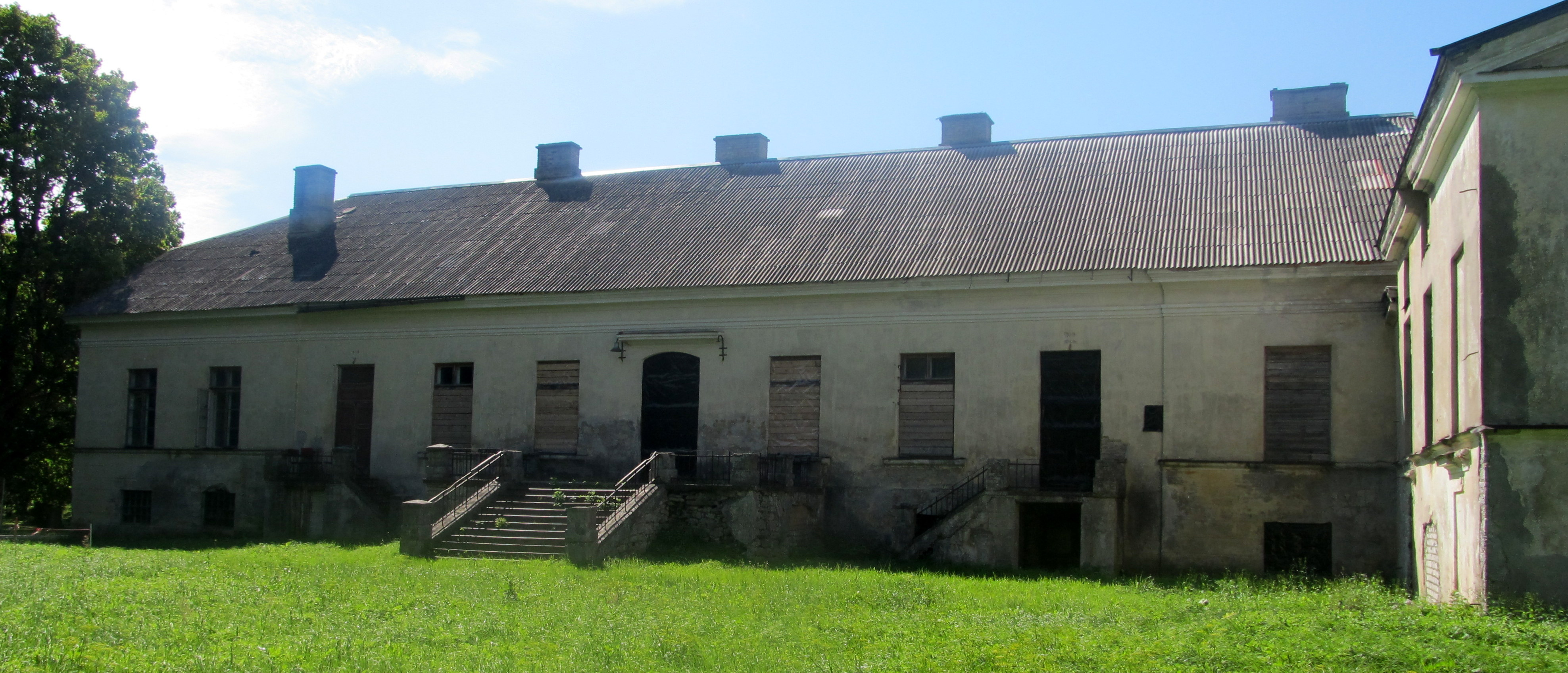 Putkaste mõisa peahoone